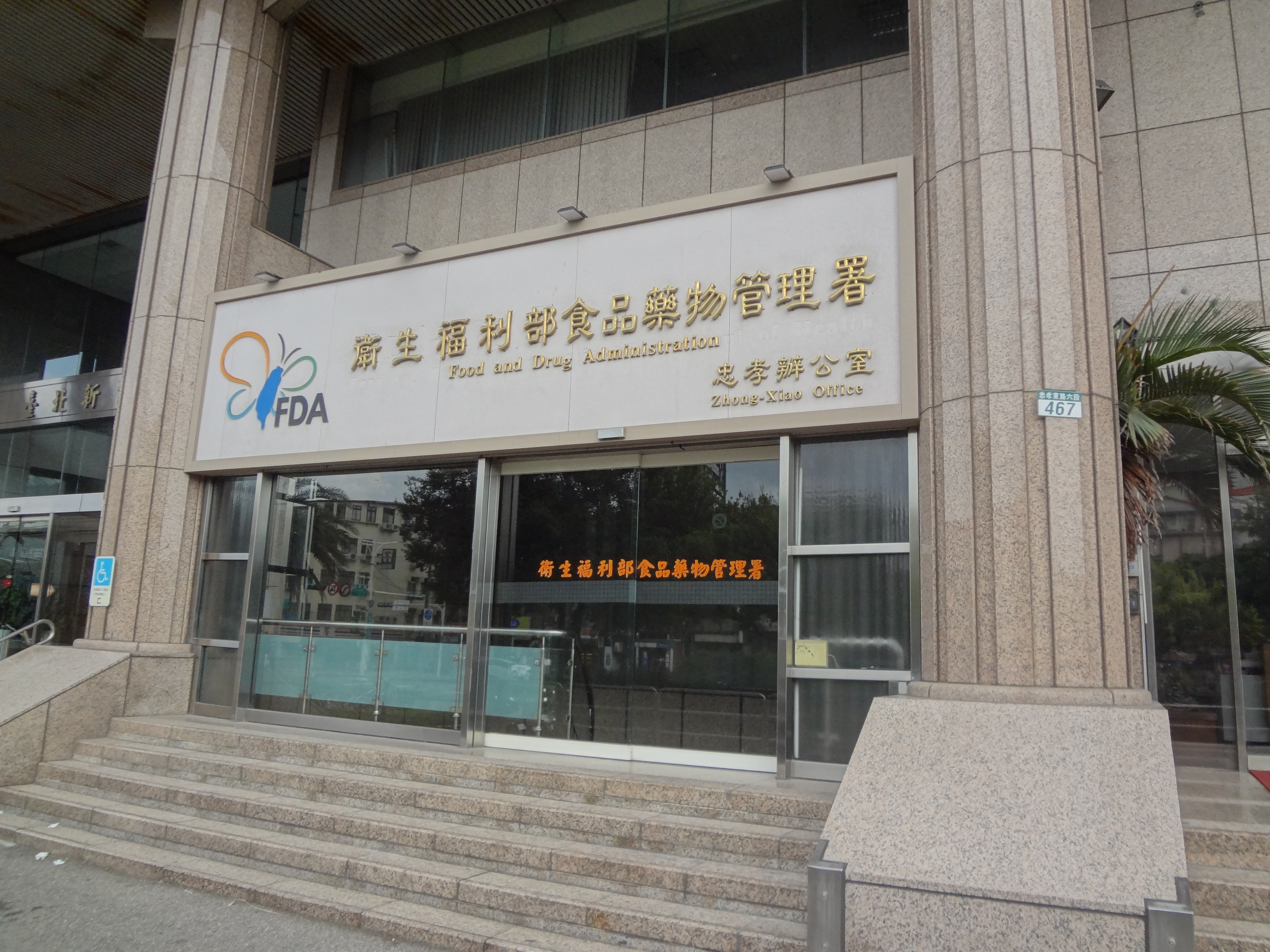 中華民國衛生福利部食品藥物管理署忠孝辦公室，位於臺北市南港區忠孝東路六段467號地下一、二樓及465號四樓（臺北新資訊大樓）。